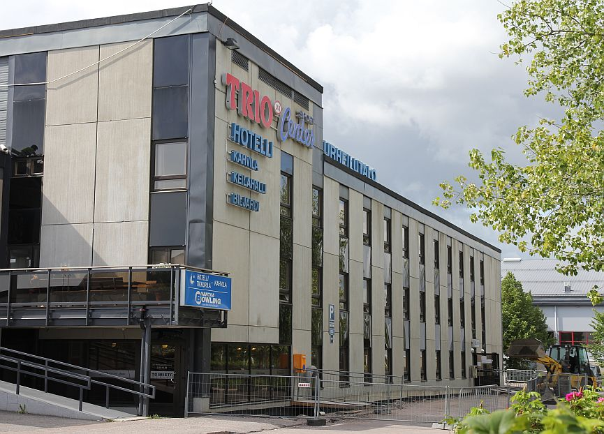 Vantaan Tikkurilan urheilutalo eli samassa rakennuksessa sijaitsevat Trio Sport Center ja hotelli Tikkurila. Rakennuksen ympristöä kunnostettin elokuussa 2013. Huom: Muista säilyttää viittaus kuvaajaan, mikäli käytät kuvaa.